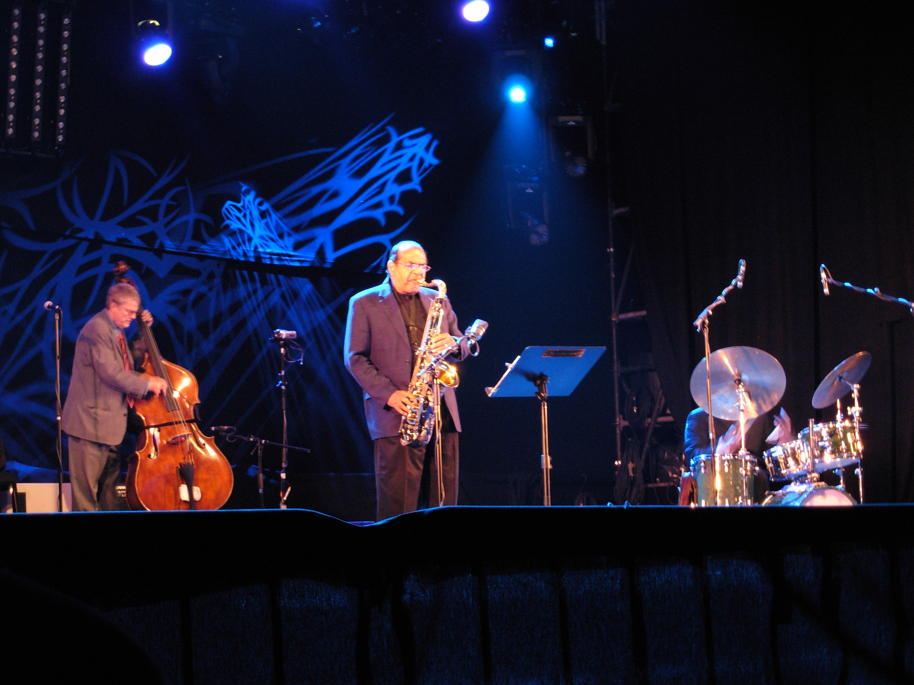 Blue Note Jazz Festival, Gent, 10-7-2007. Charlie Haden: Bajo Ernnie Watts: Saxo Alan Broadbent: Piano Rodney Green: Batería